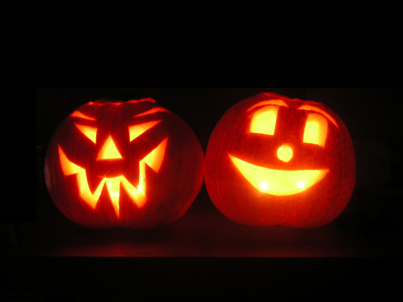 Jack o'lantern : Ange et démon